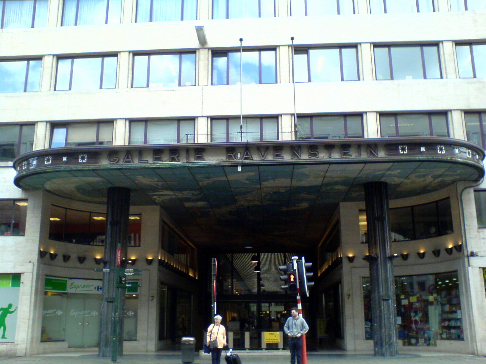 Ingang van de Ravensteingallerij aan het centraal-station